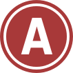 京福電気鉄道嵐山本線の路線記号。DejaVu Sansフォントを使用して作成